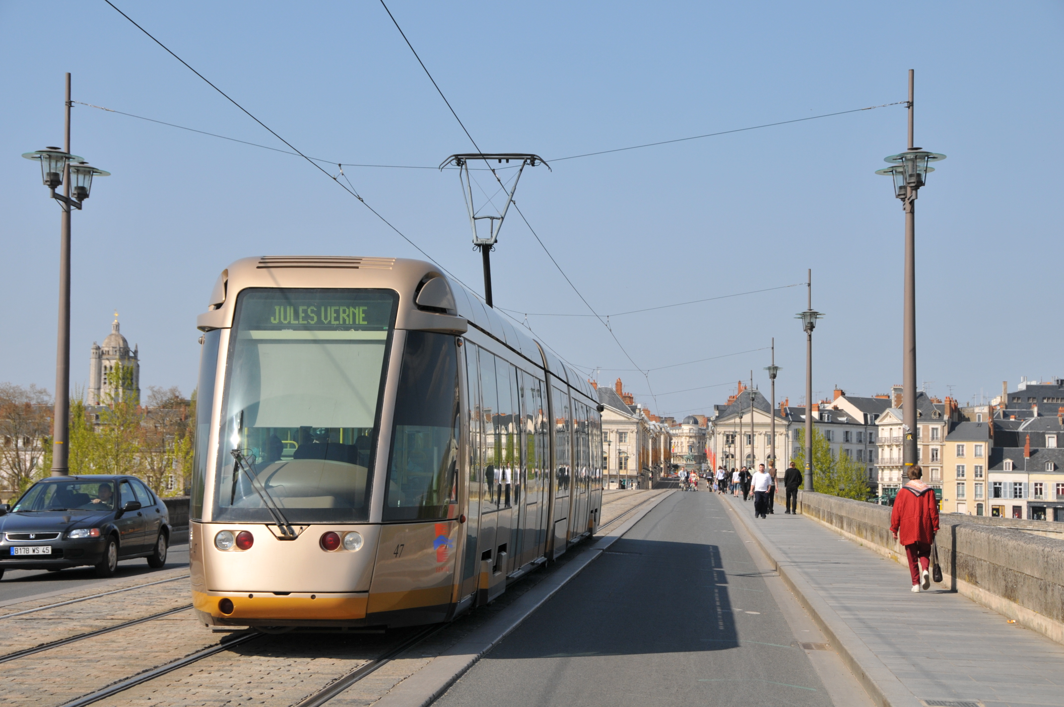 Tramway sur le pont George V, Orléans, Loiret, France